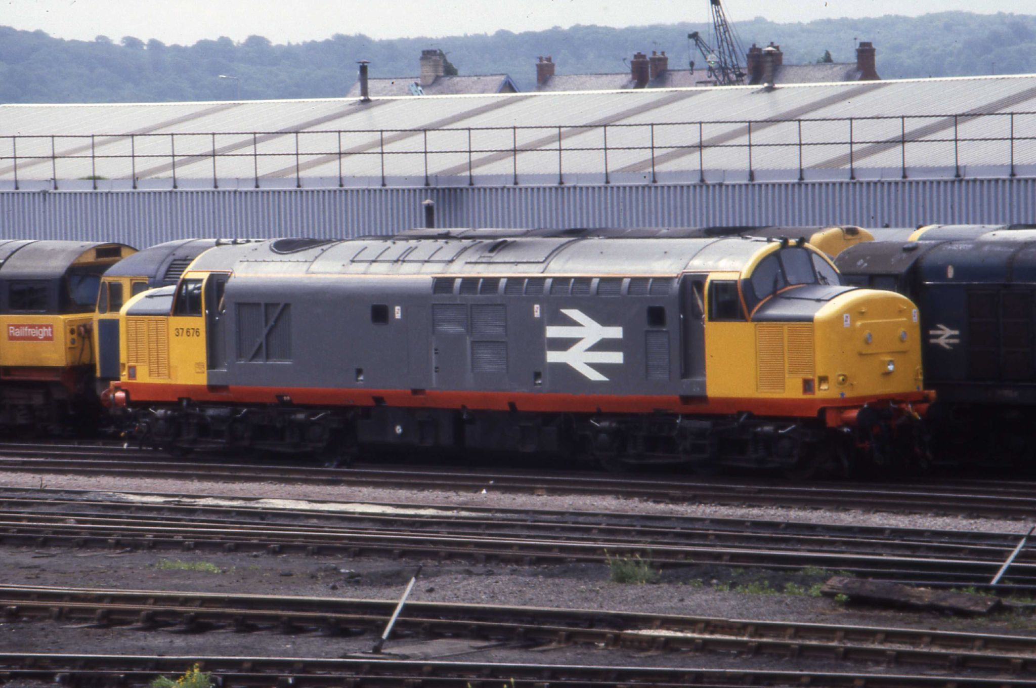 Worksop Depot